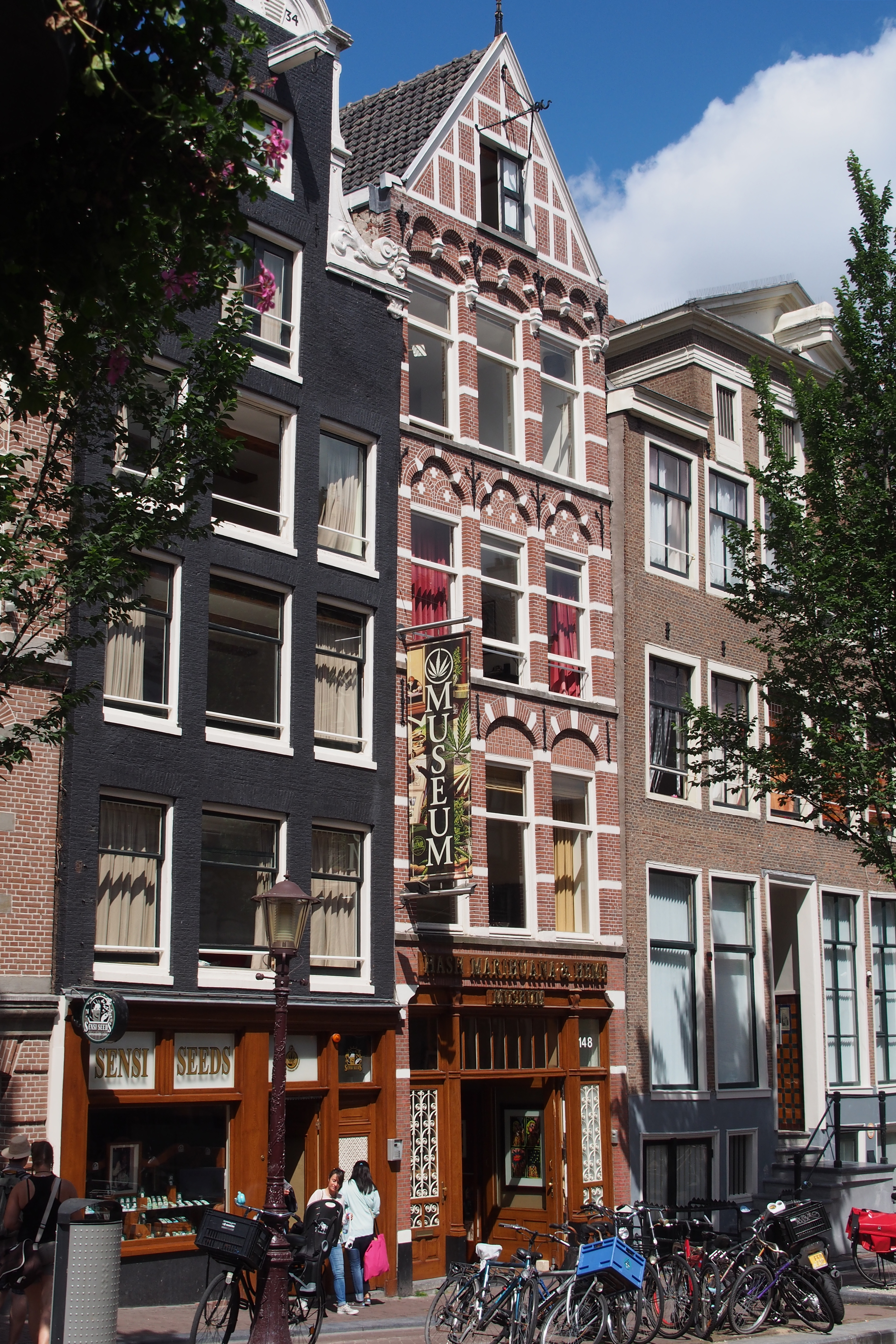 Hash Marihuana & Hemp Museum, Oudezijds Achterburg Amsterdam